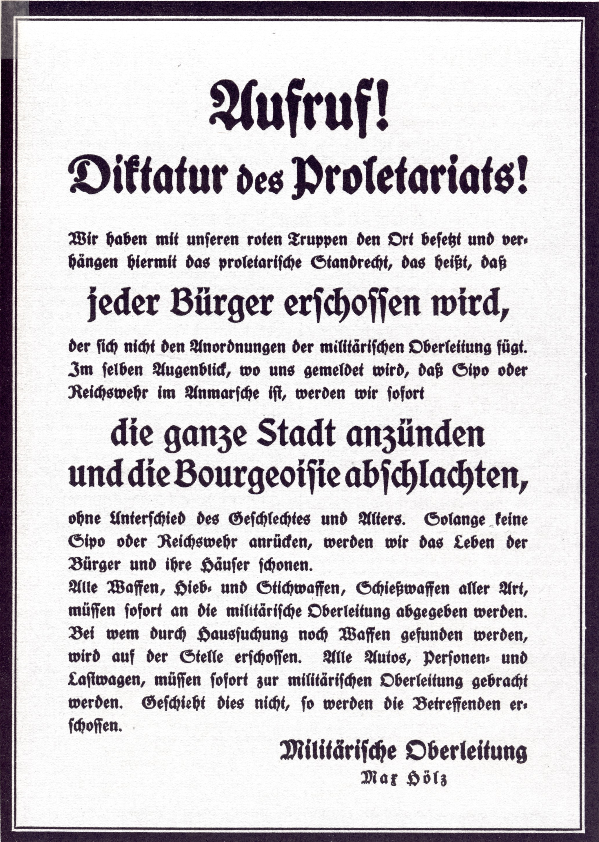 Flugblatt des Spartakusaufstandes 1919